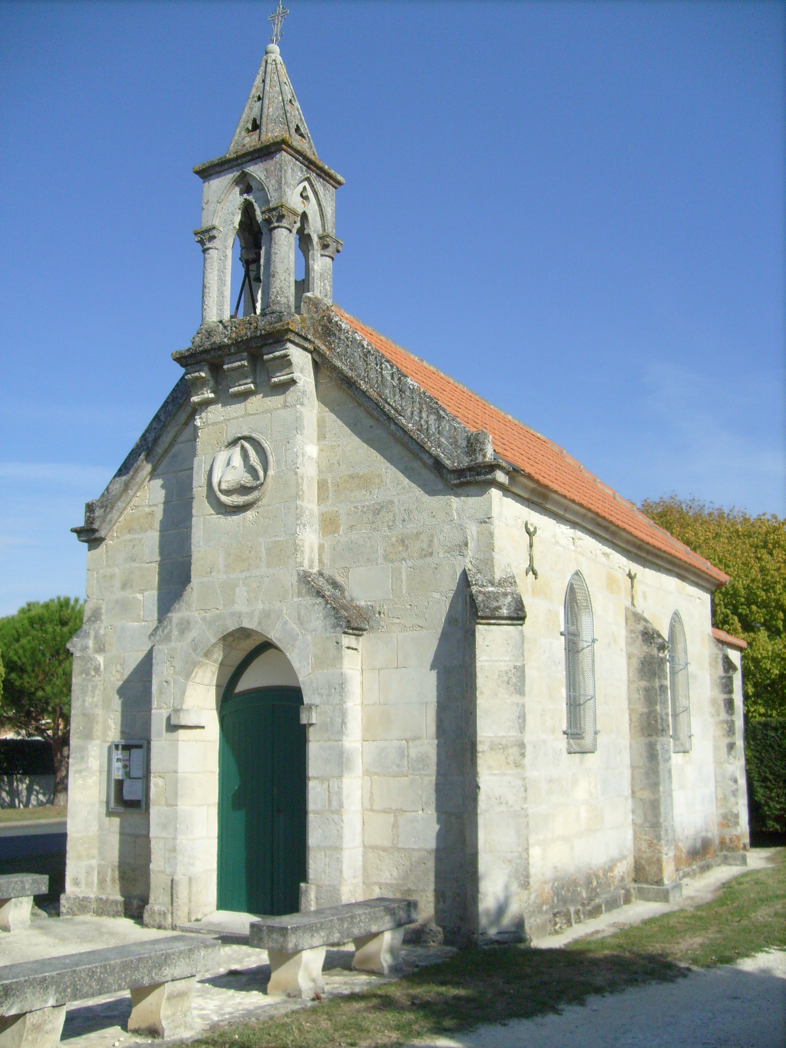 L'église Saint-Joseph de Grand-Village-Plage